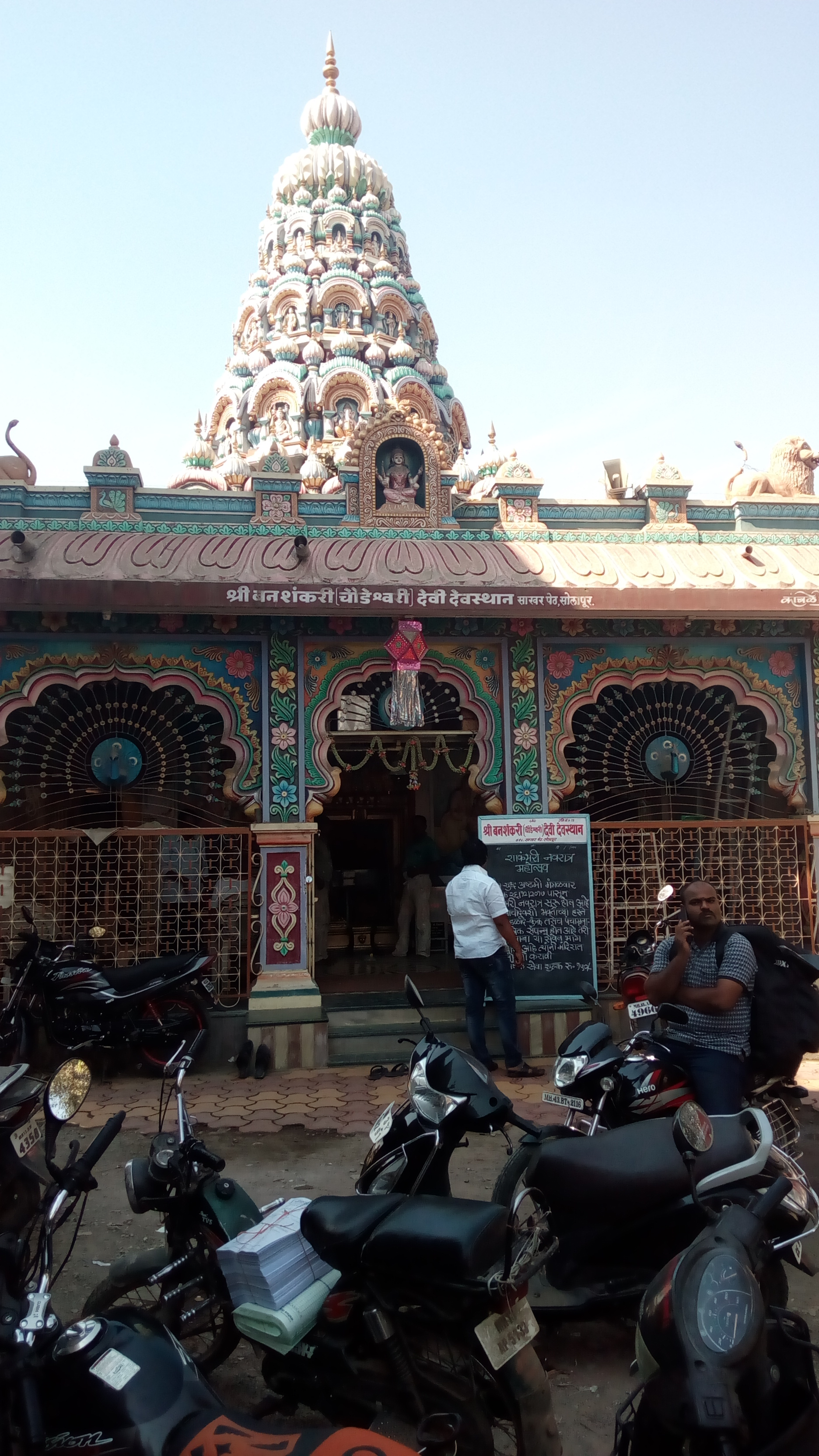 मंदिर परिसर